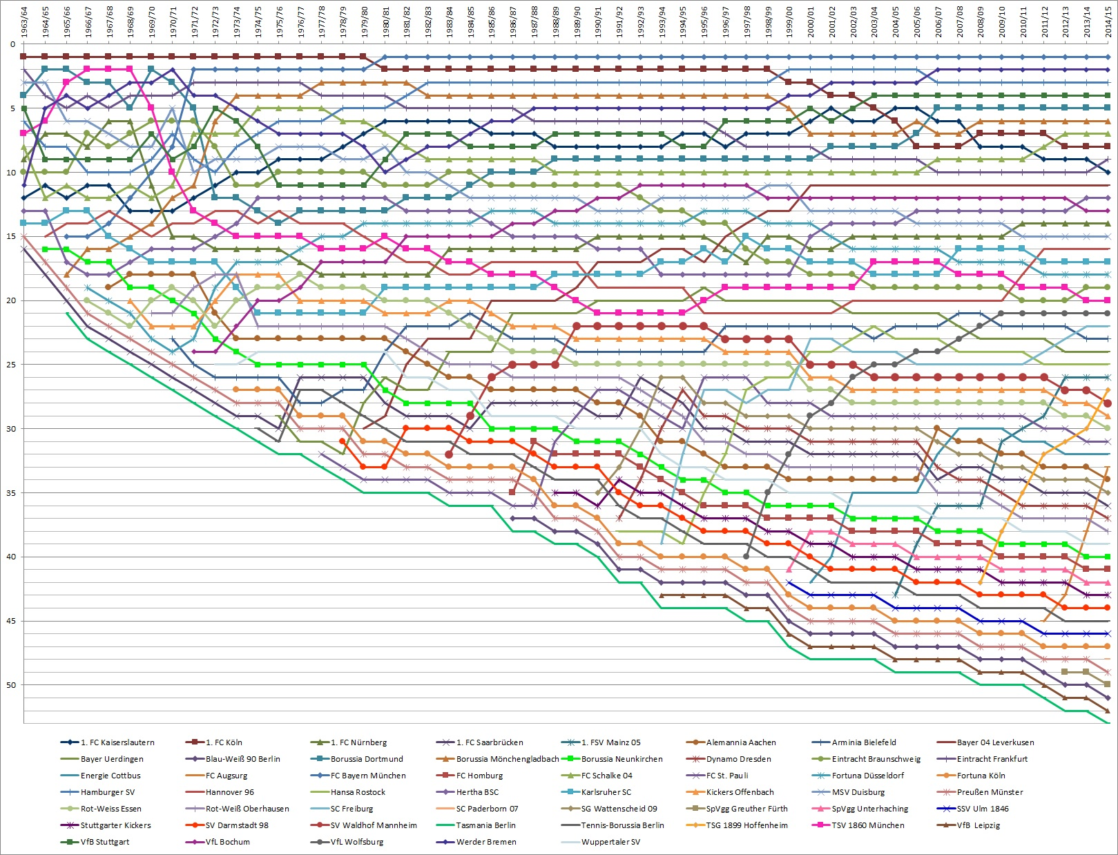 Platzierungsverlauf in der Ewigen Tabelle der Fußball-Bundesliga